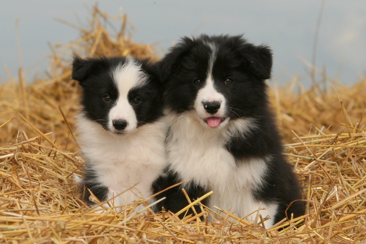 L'élevage de Grimmauprès se situe en Belgique, 0(032)475 225543